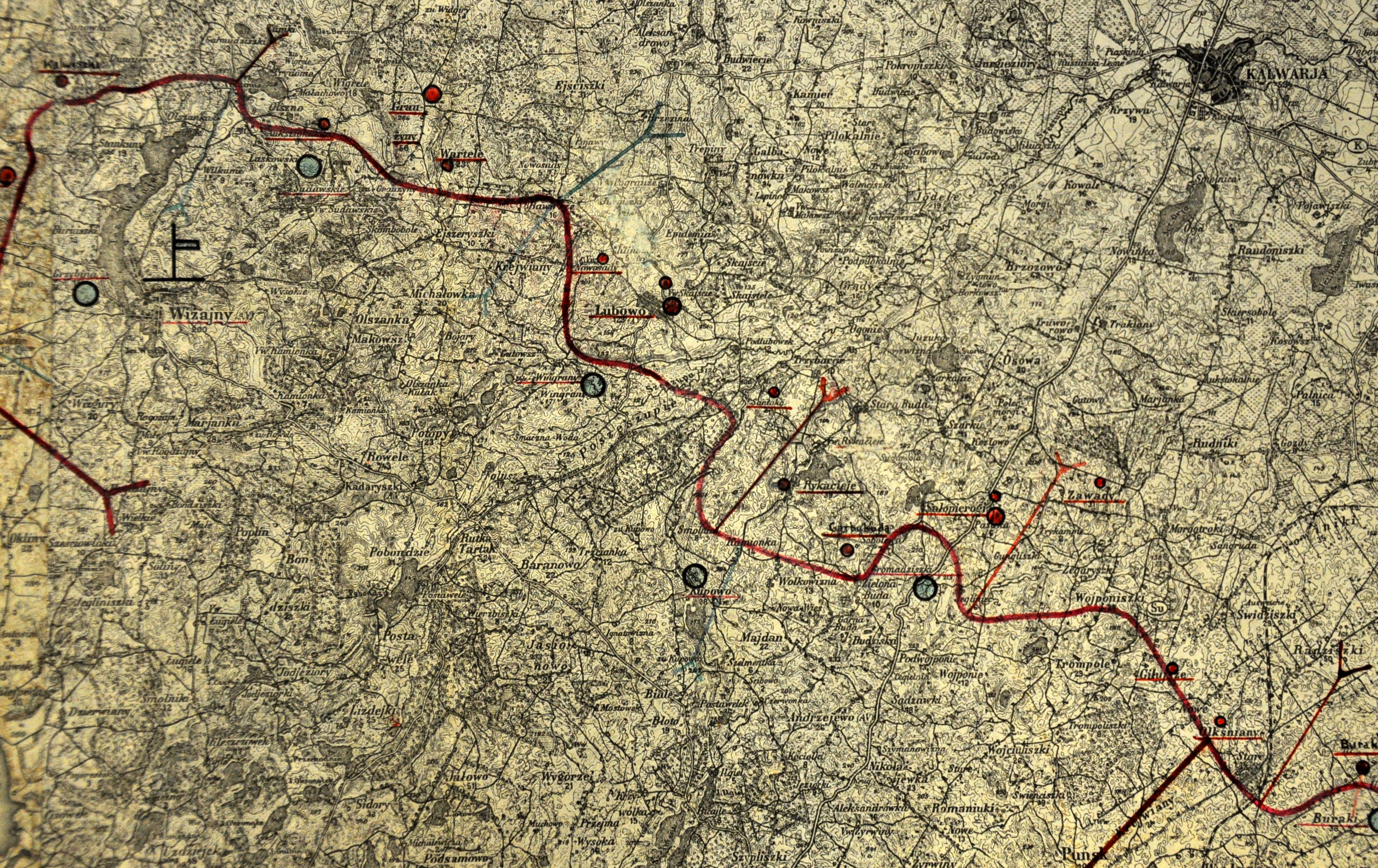 Strażnice kompanii granicznej KOP Wiżajny